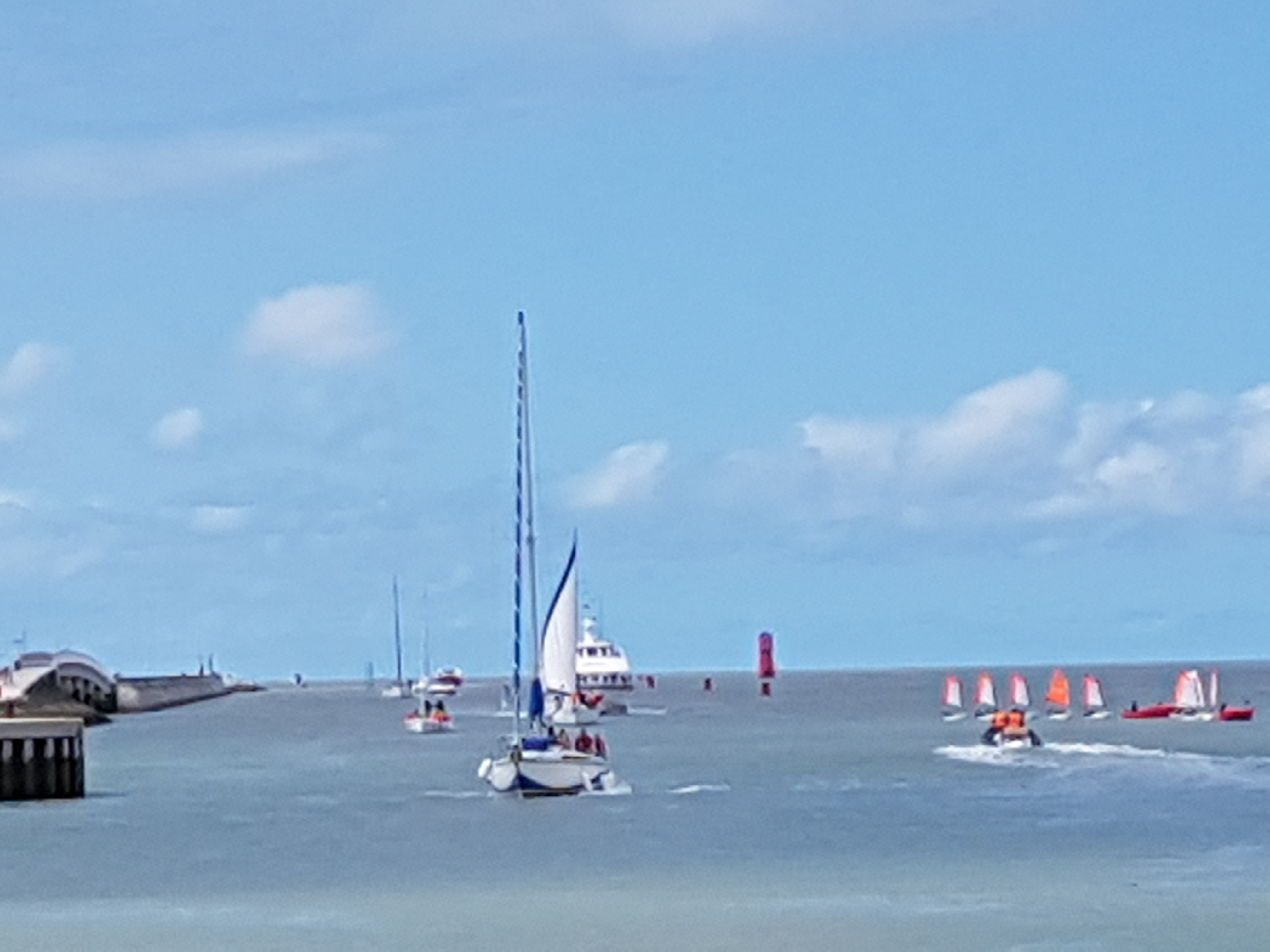 Vitesse limitée à 5 nœuds : vous avez le temps de profiter du paysage !